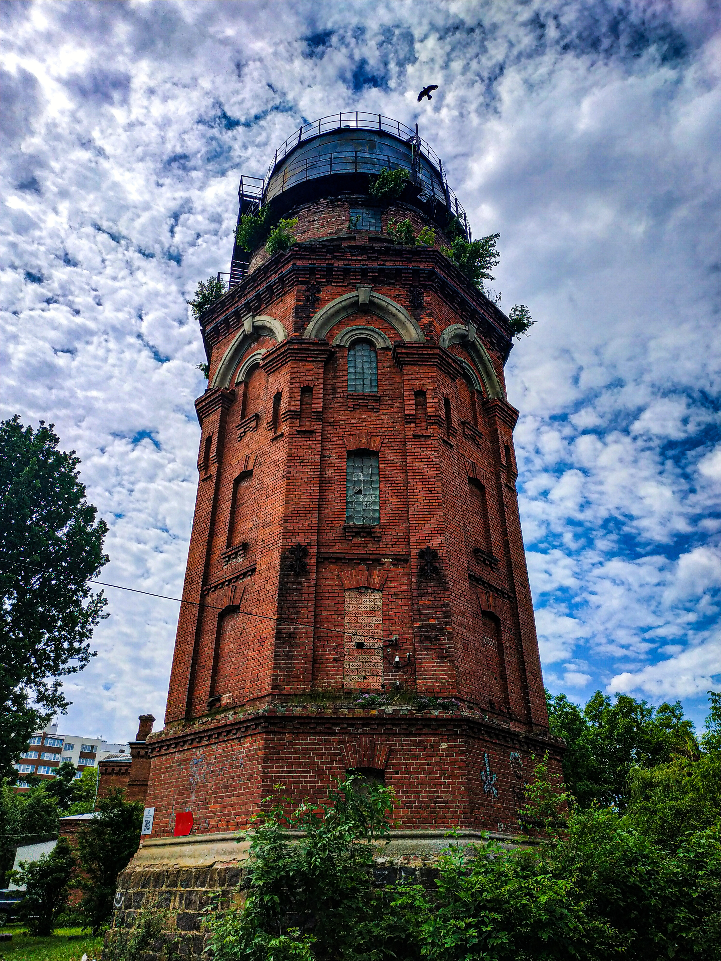 Водонапірна вежа по вулиці Гастелло